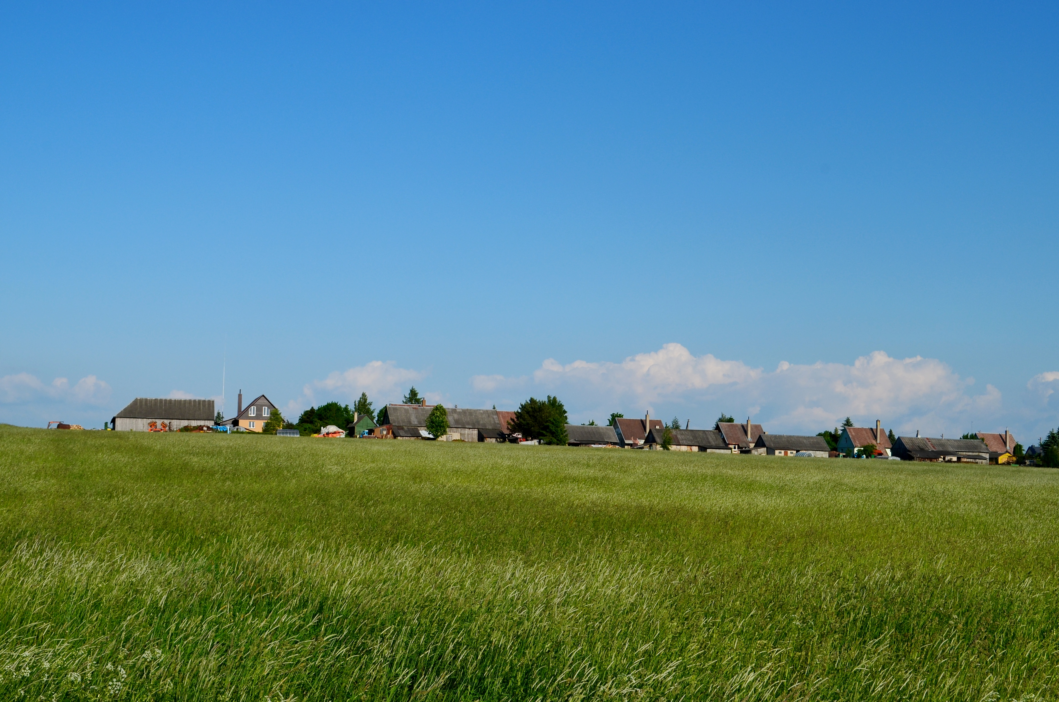 Liučiūnai, Kauno raj.